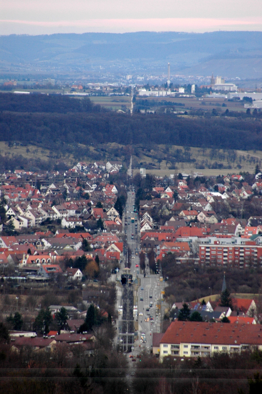 Detailblick vom Schloss Solitude (Stuttgart) auf die Solitudeallee (Ludwigsburg)